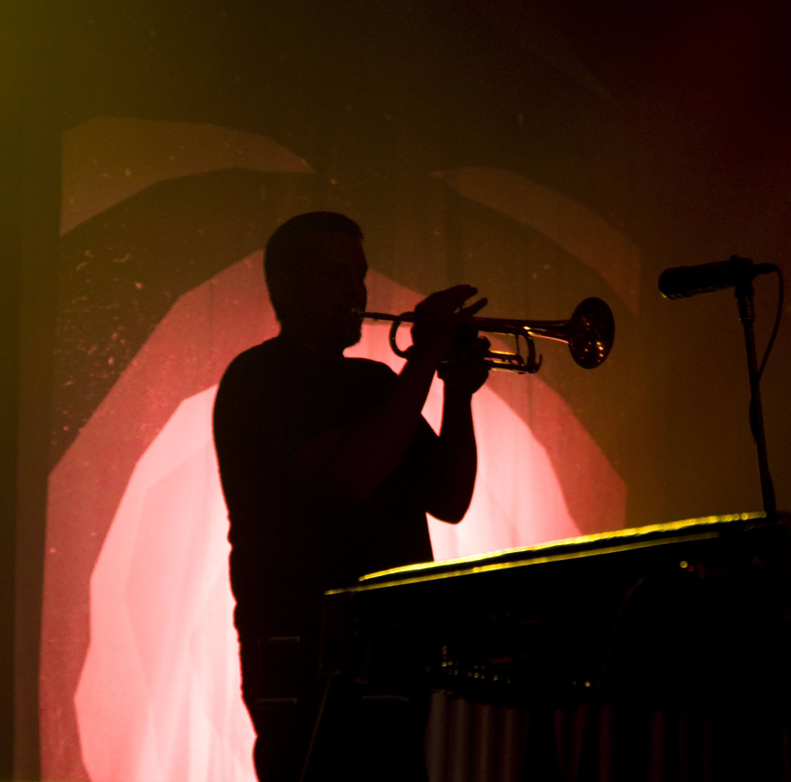 Das Zelt-Musik-Festival 2016 in Freiburg im Breisgau 13.07.2016 Calexico